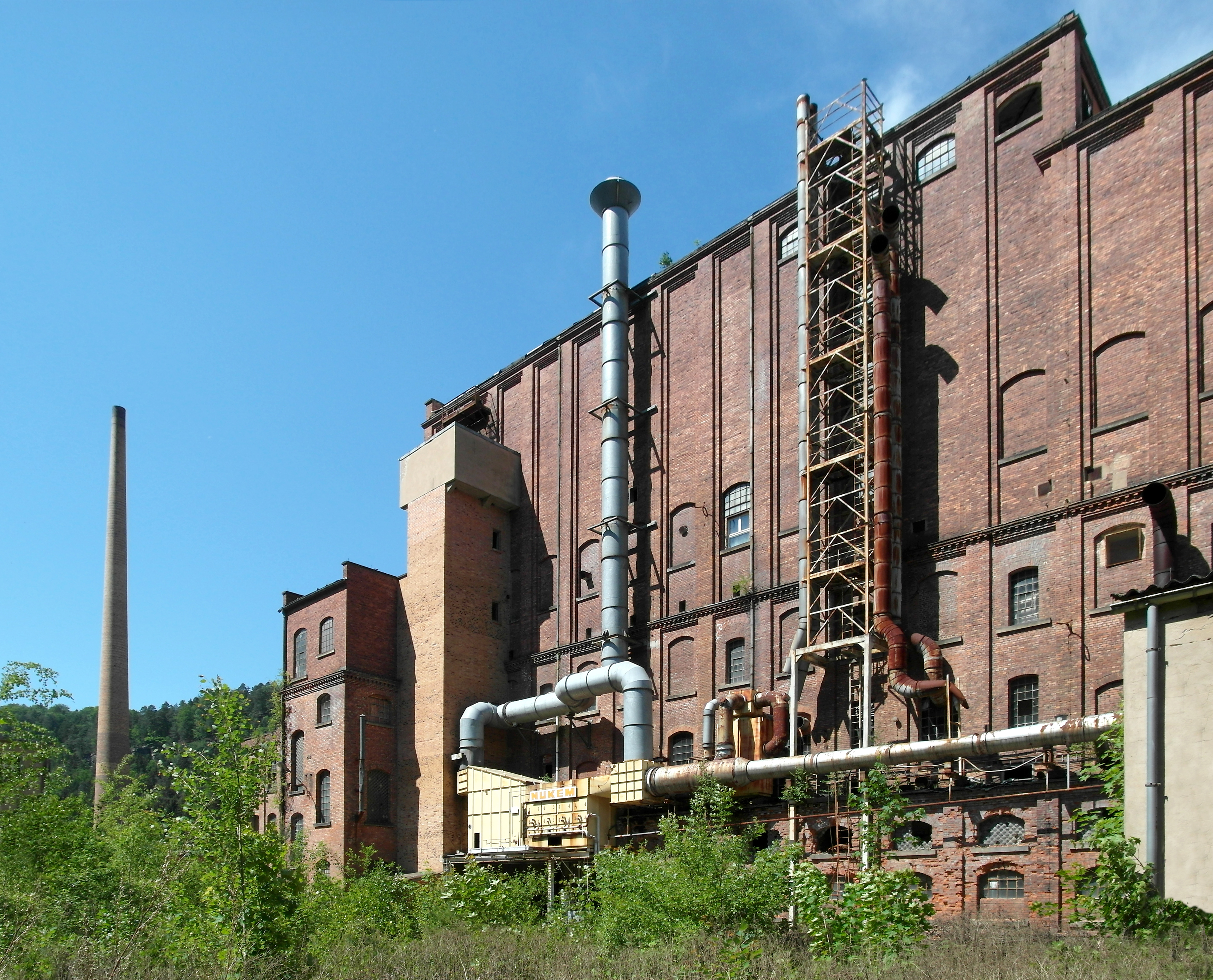 14.05.2018 01848 Kohlmühle (Hohnstein), Sebnitztalstraße 1: Der Standort der Kohlmühle hat eine jahrhundertealte Geschichte. Die heutige Werksanlage Kohlmühle (GMP: 50.940689,14.163807) entstand aus der 1902/03 erbauten Papiermühle der Fabrikantenfamilie Keffel, die in den 1930er Jahren zur Linoleumproduktion umgebaut und erweitert wurde. In den 1940er Jahren wurden hier Junkers-Flugzeugmotoren produziert. In der DDR-Zeit VEB Linoleumwerk Kohlmühle. Die nach der Wende privatisierte Kohlmühle wurde wegen Insolvenz im Mai 2016 versteigert und verkauft. Hier das Werksgebäude (GMP: 50.940689,14.163807) von Südosten. [SAM6225.JPG]20180514520DR.JPG(c)Blobelt